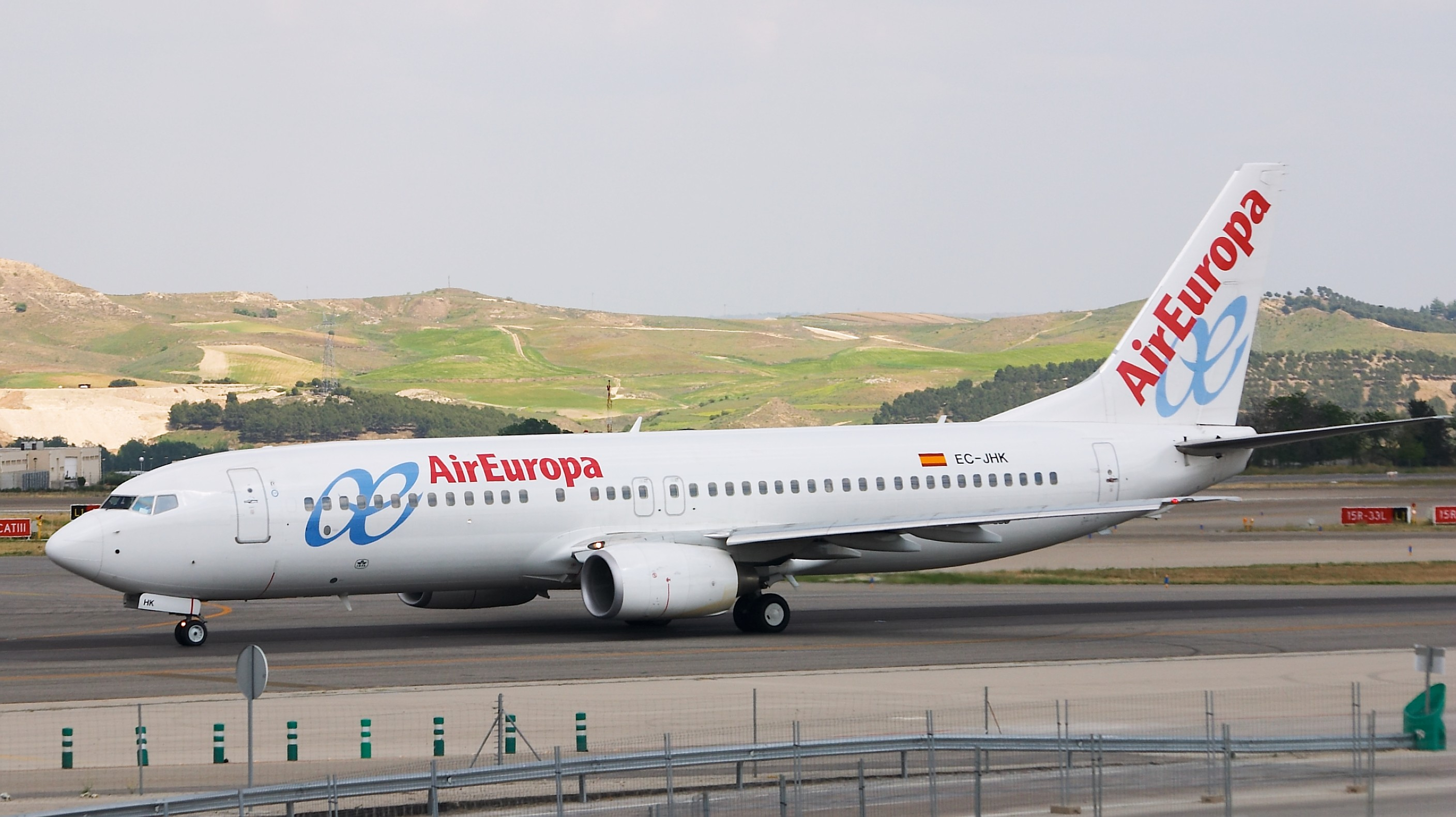 Boeing 737-85P de AirEuropa. Aeropuerto de Madrid Barajas.